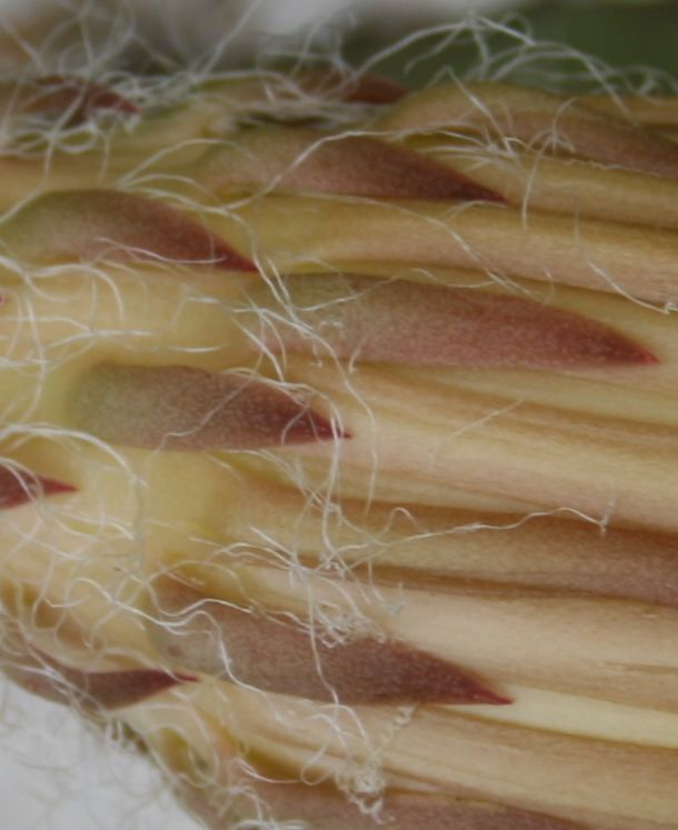 Selenicereus grandiflorus virágtölcsérének areolái